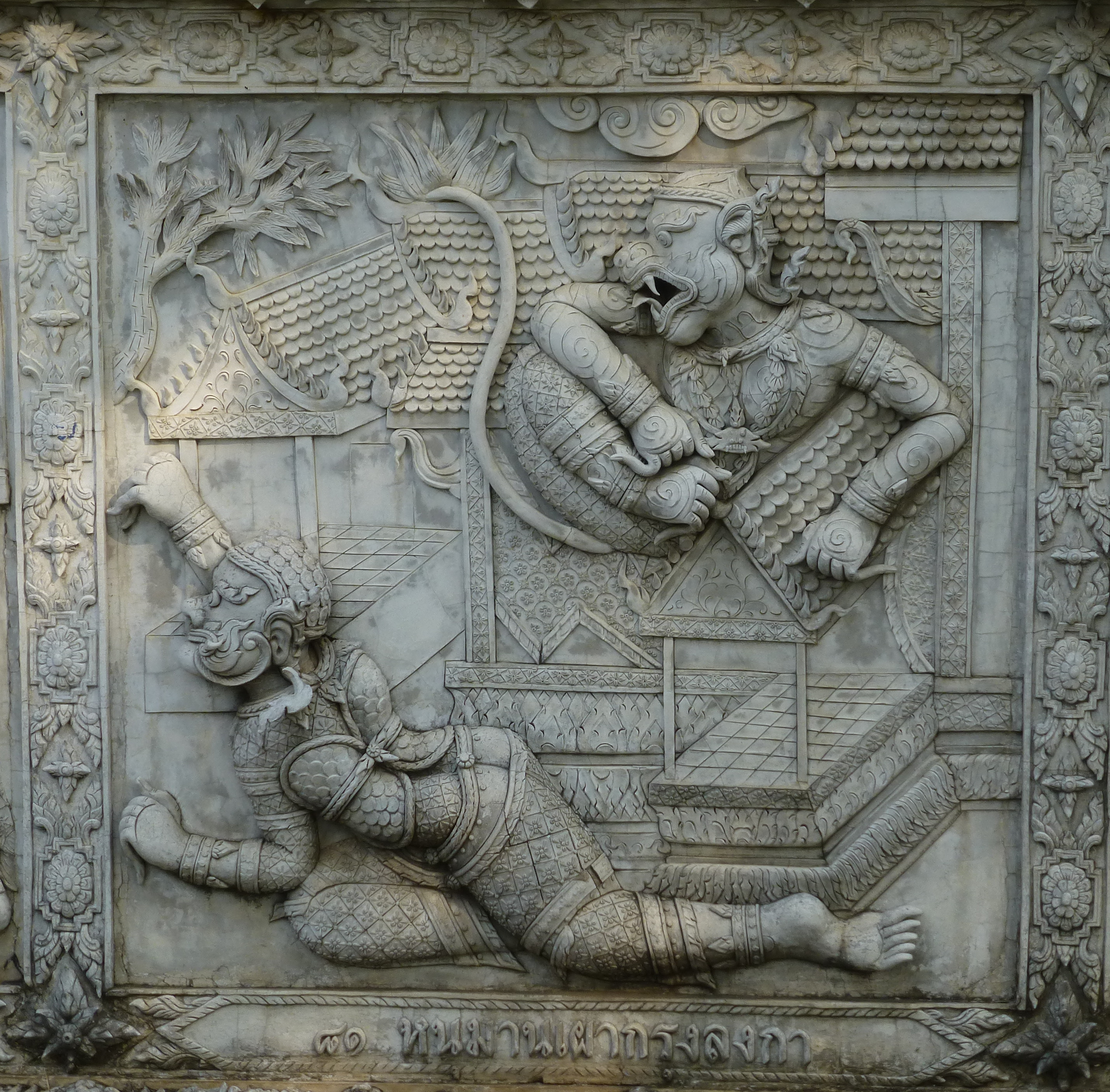 115 Hanuman set Lanka on Fire, at Wat Phananchoeng, Ayutthaya